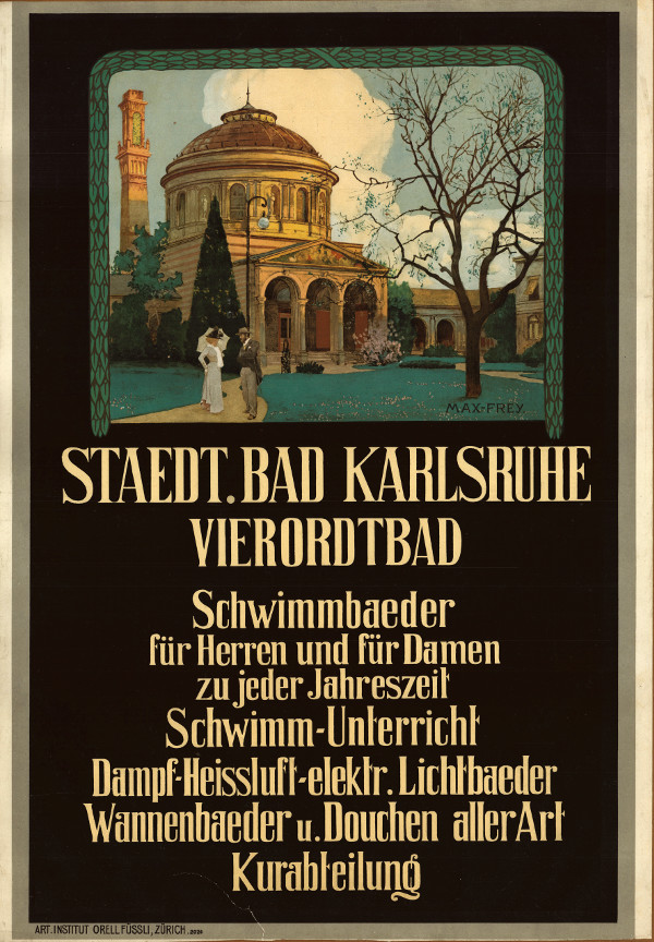 Max Frey. Plakat für das Städtische Vierordtbad in Karlsruhe, um 1900.